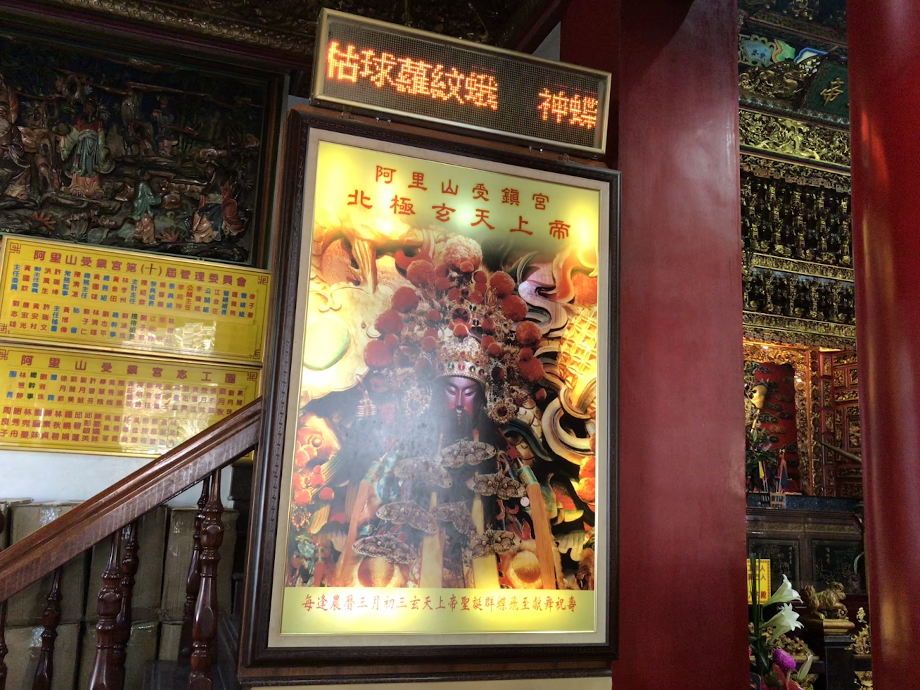 阿里山受鎮宮的神蛾看板。